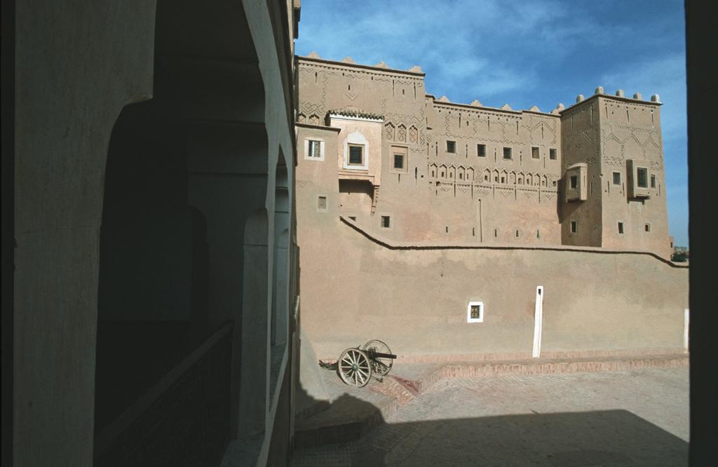 Kasbah Taouirt, Ouarzazate, Innenhof